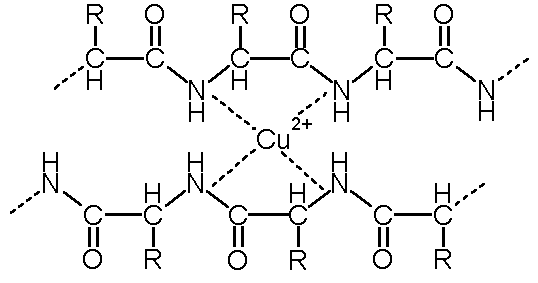 Akane700作成。ビウレット反応の概念図。